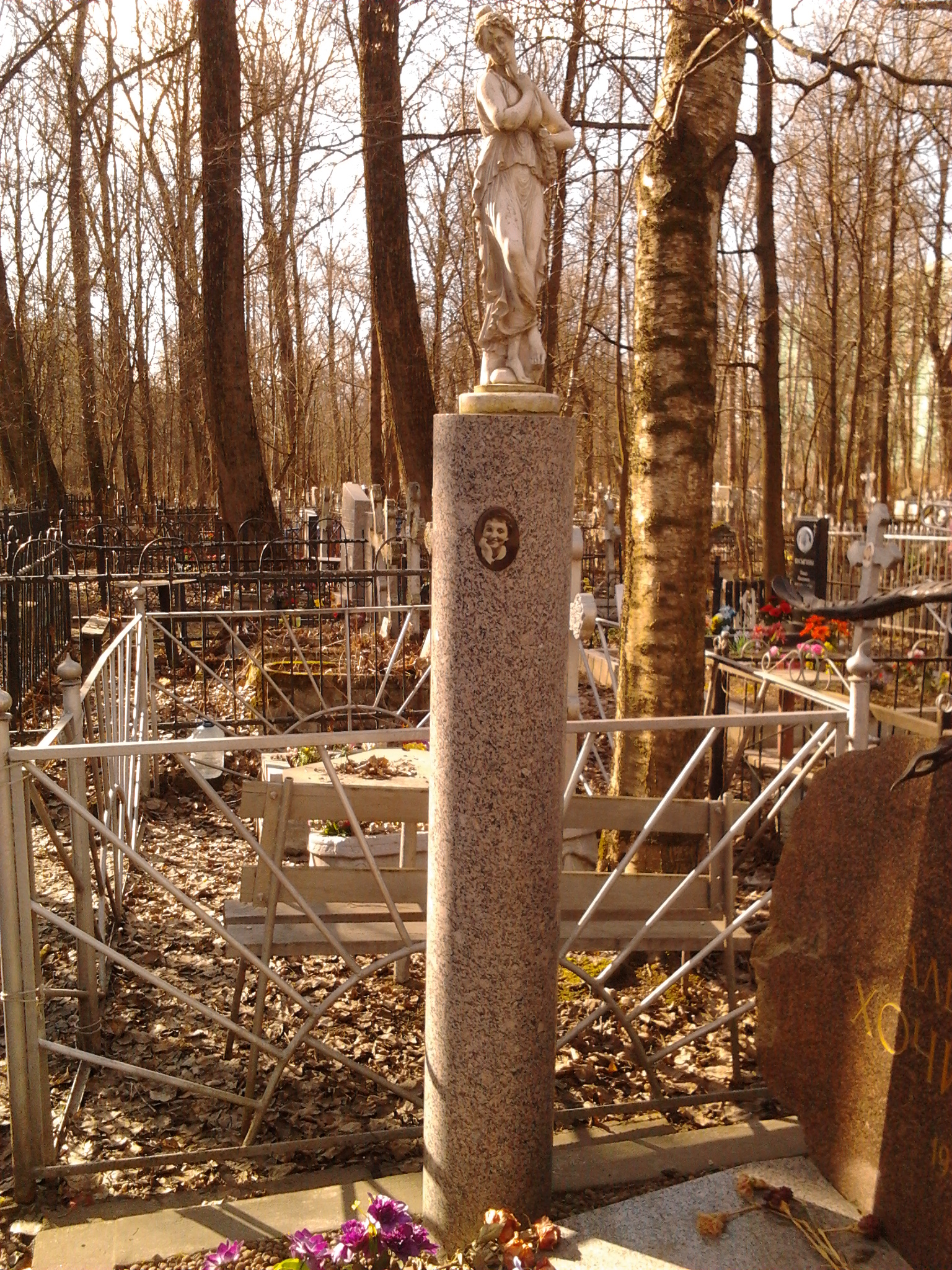 Стела с портретом на могиле А. Н. Шурановой.